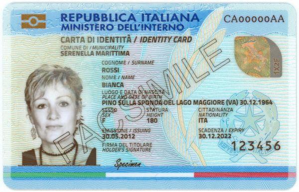 Fac-simile del fronte della nuova Carta d'identità elettronica (CIE) introdotta a partire dal 2016